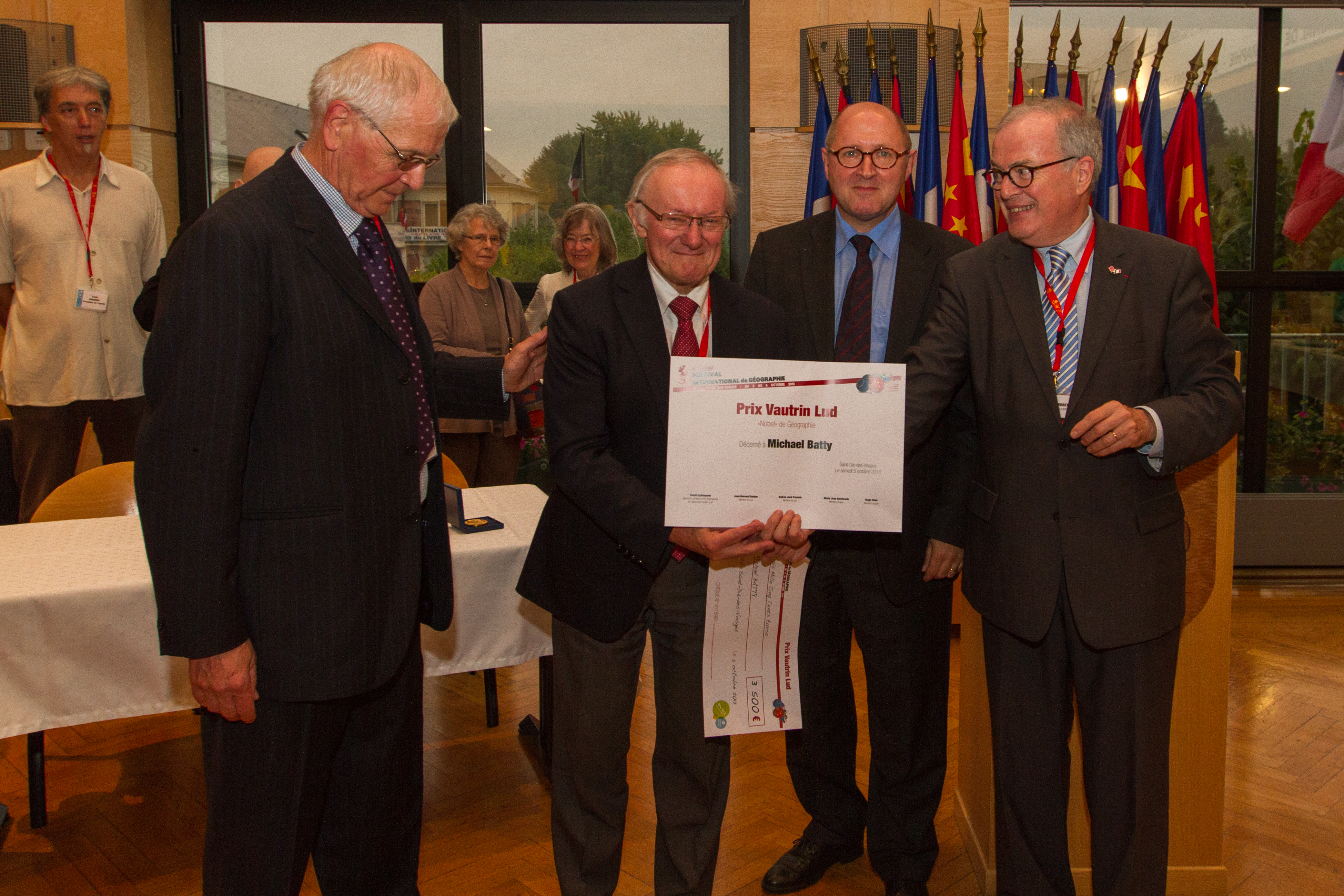 FIG 2013 Remise prix Vautrin Lud à Michael Batty